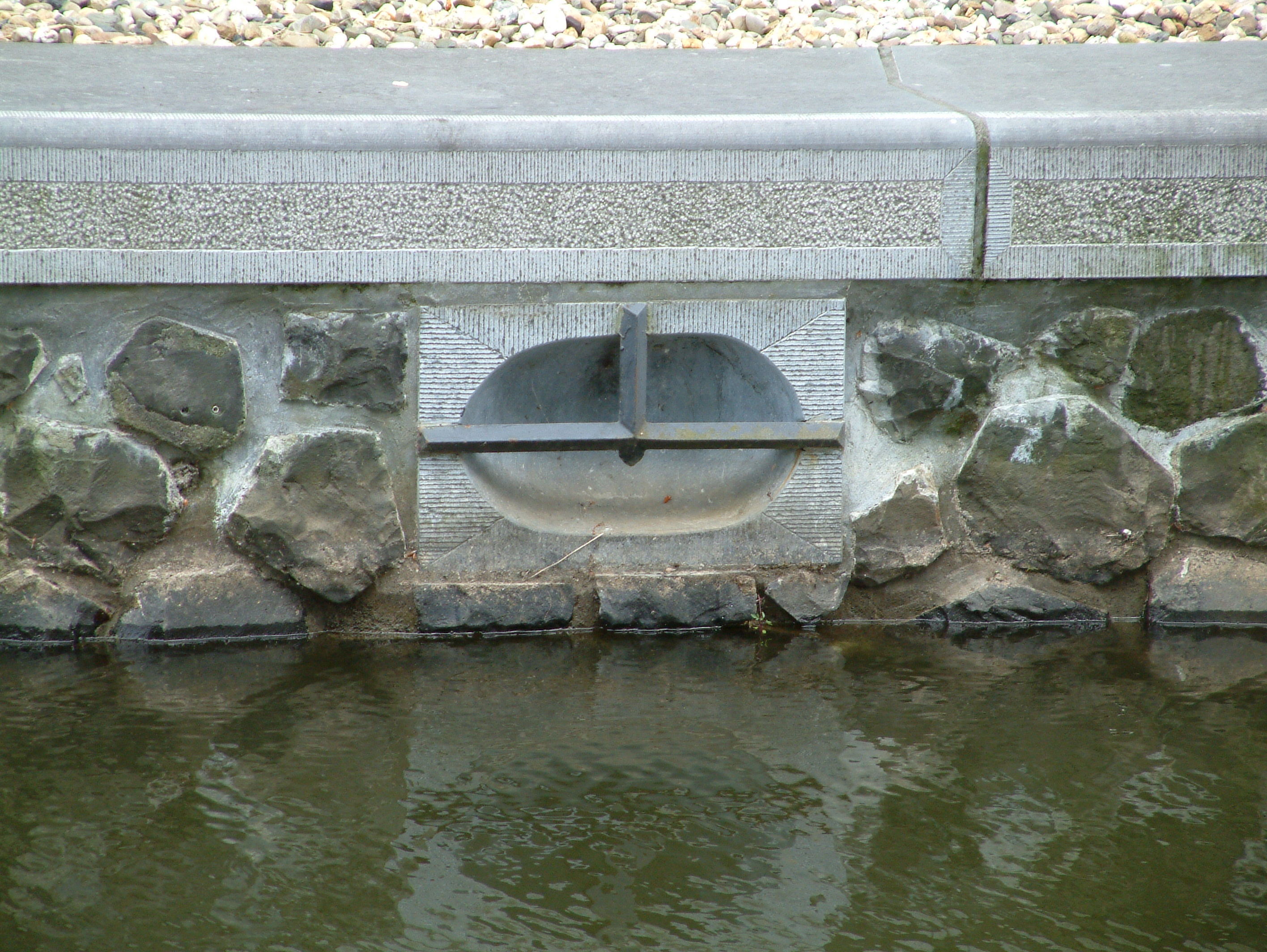 Sluis in het Apeldoorns kanaal van Dieren naar Hattem